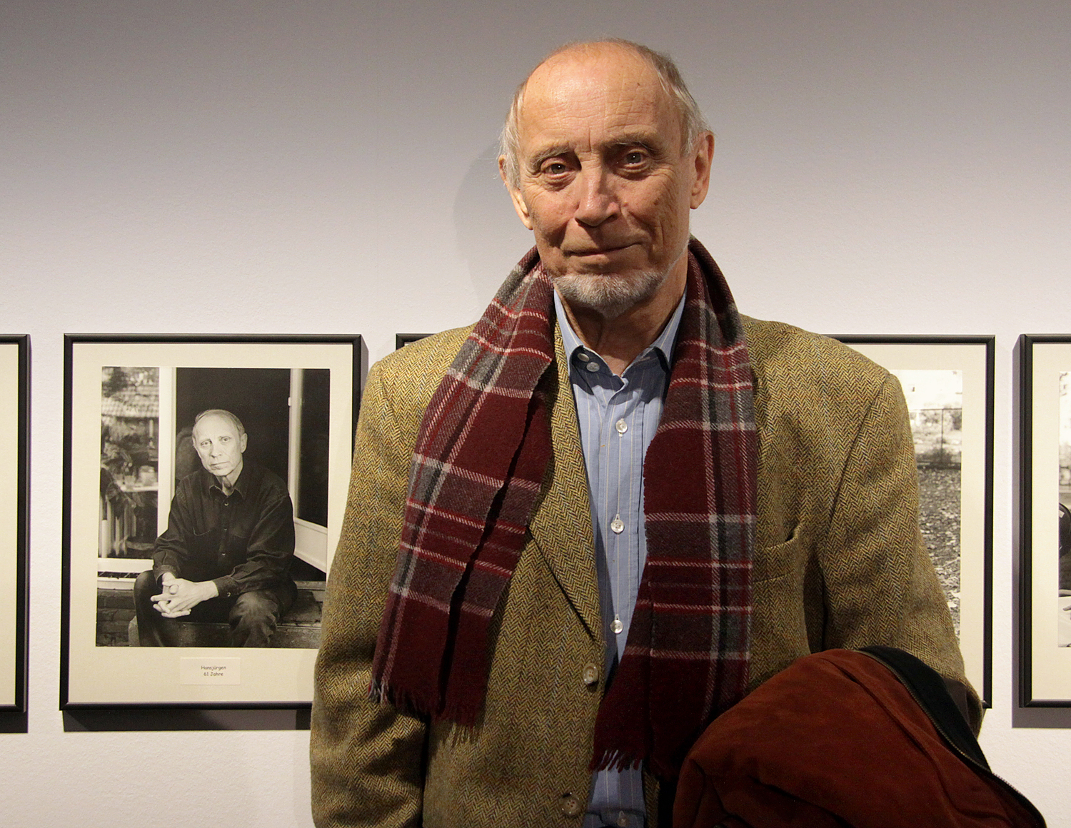 Hansjürgen Bulkowski vor "100 Jahre" von Hans-Peter Feldmann, 29.04.2016, c/o berlin, Berlin